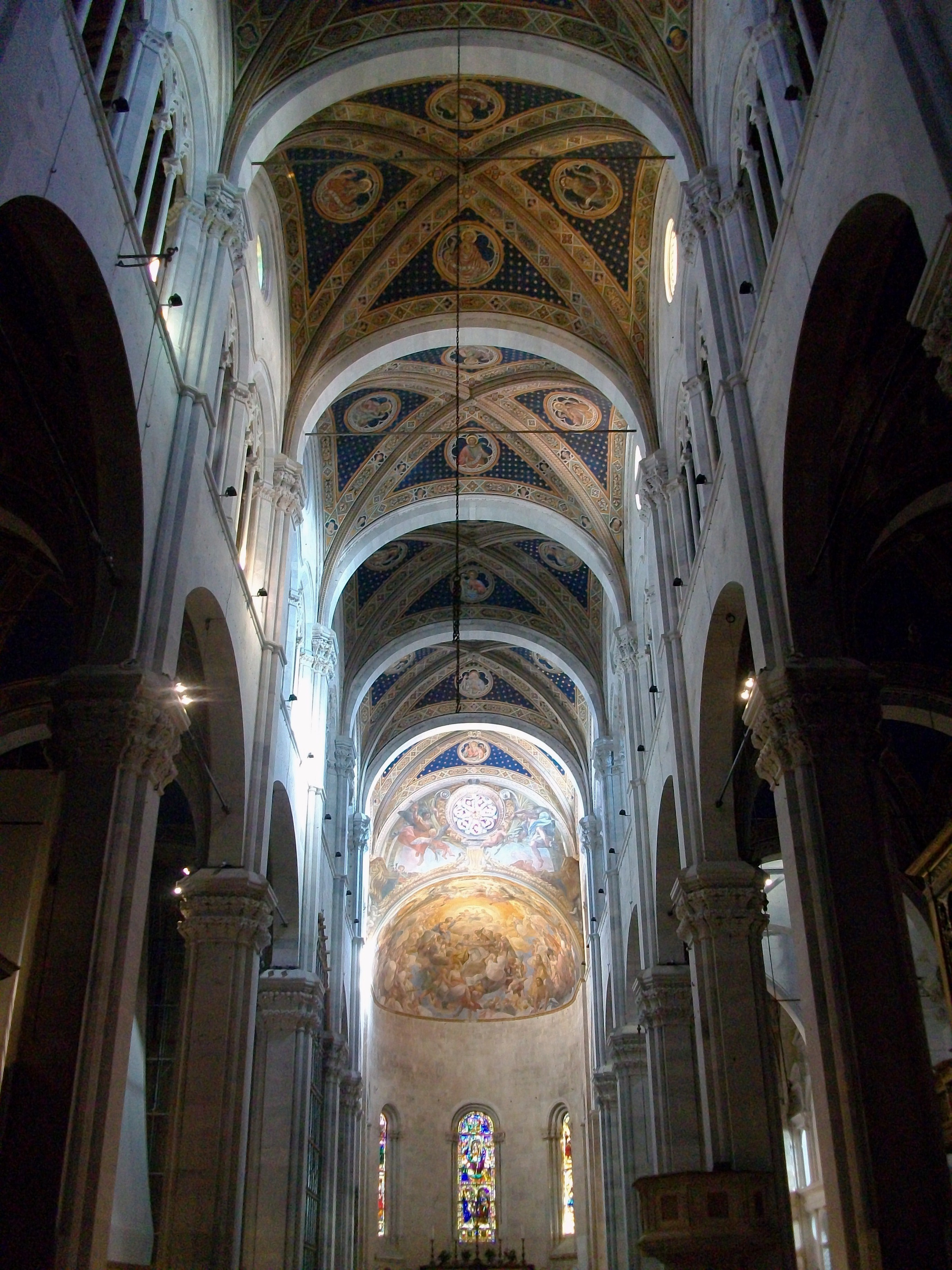 Interior de la catedral de Lucca